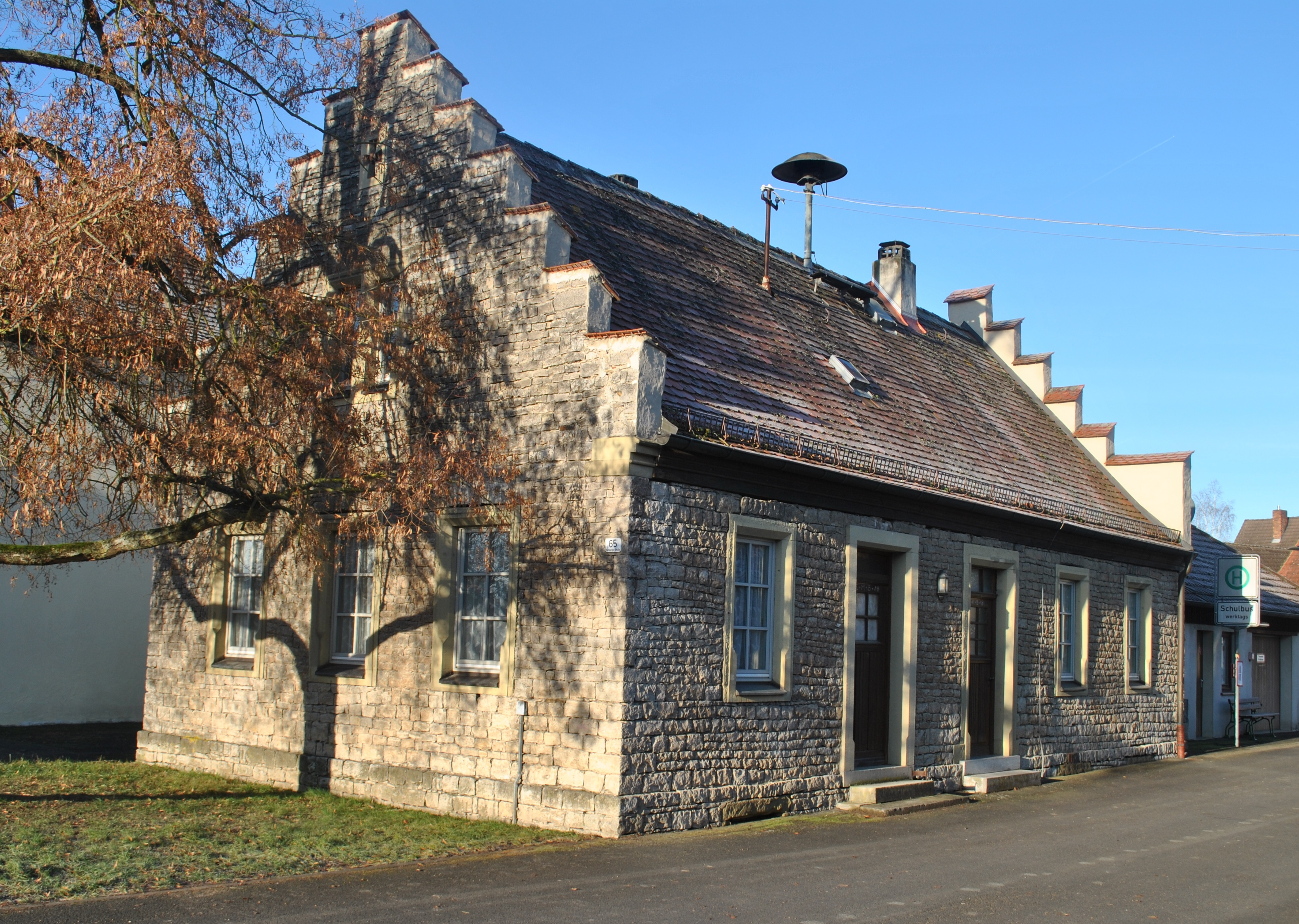 Ehemaliges Rathaus der Gemeinde Düllstadt, heute Gemeindehaus, Bamberger Straße